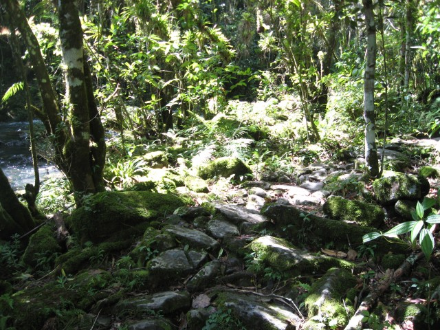 El Nicho, Cuba